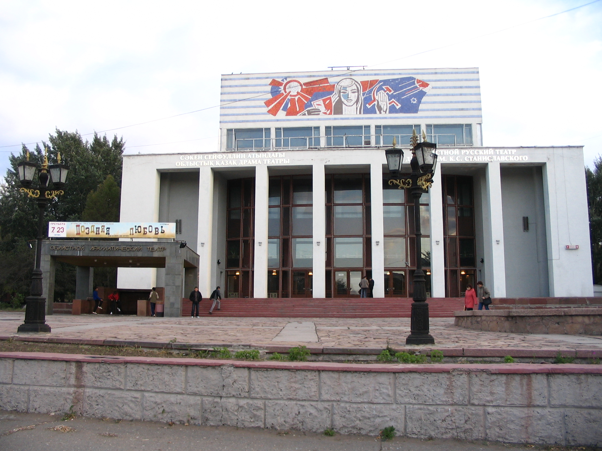 Название: Областной драматический театр (Караганда). СӘКЕН СЕЙФУЛЛИН АТЫНДАҒЫ ОБЛАСТЫҚ ҚАЗАҚ ДРАМА ТЕАТРЫ ОБЛАСТНОЙ РУССКИЙ ТЕАТР ДРАМЫ ИМ. К. С. СТАНИСЛАВСКОГО